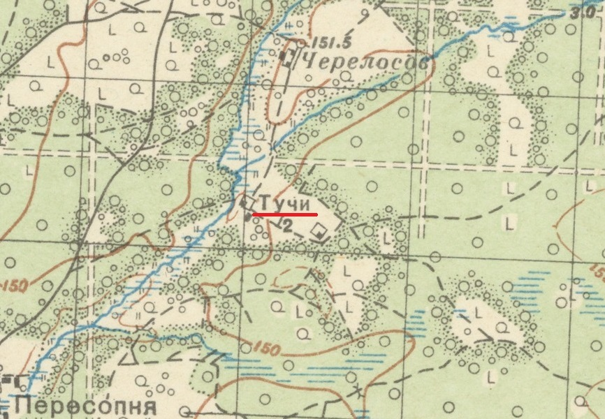 Chutor Tuczy (Rogi z powieści "Nadberezyńcy"). Fragment mapy sowieckiej z 1937 roku.